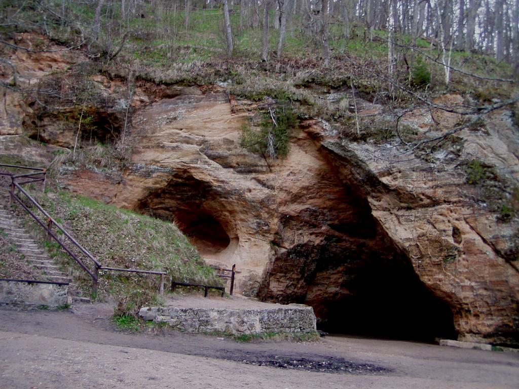 Gūtmaņa ala 2005-05-06